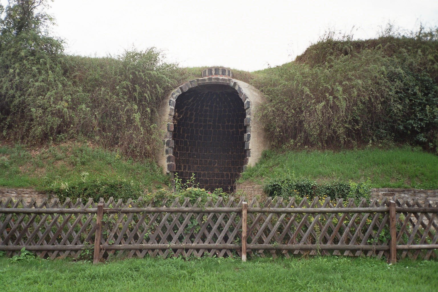 Lagerbehälter für Getreide in Friedeburgerhütte, Sachsen-Anhalt